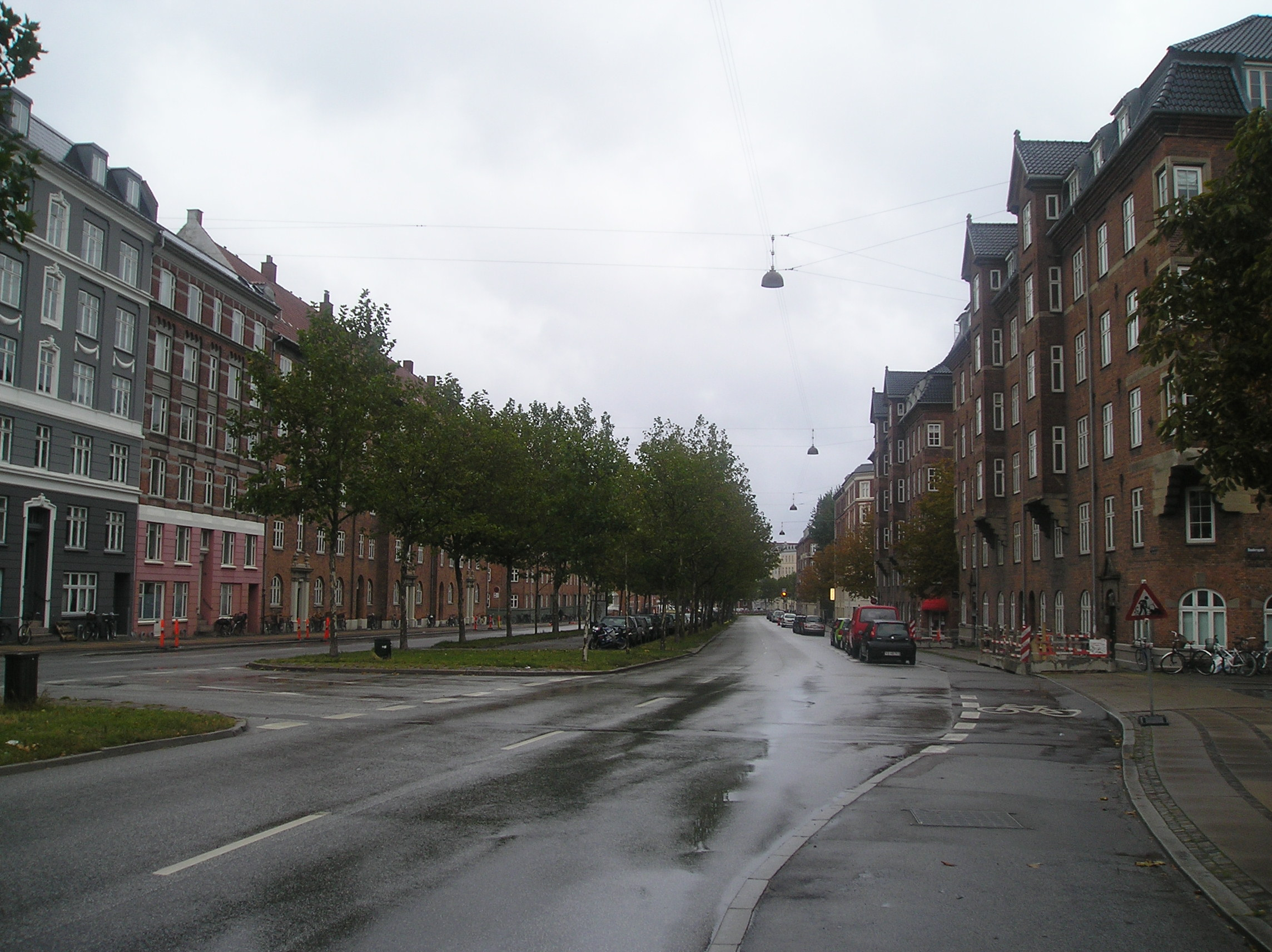 The street Strandboulevarden in Copenhagen.